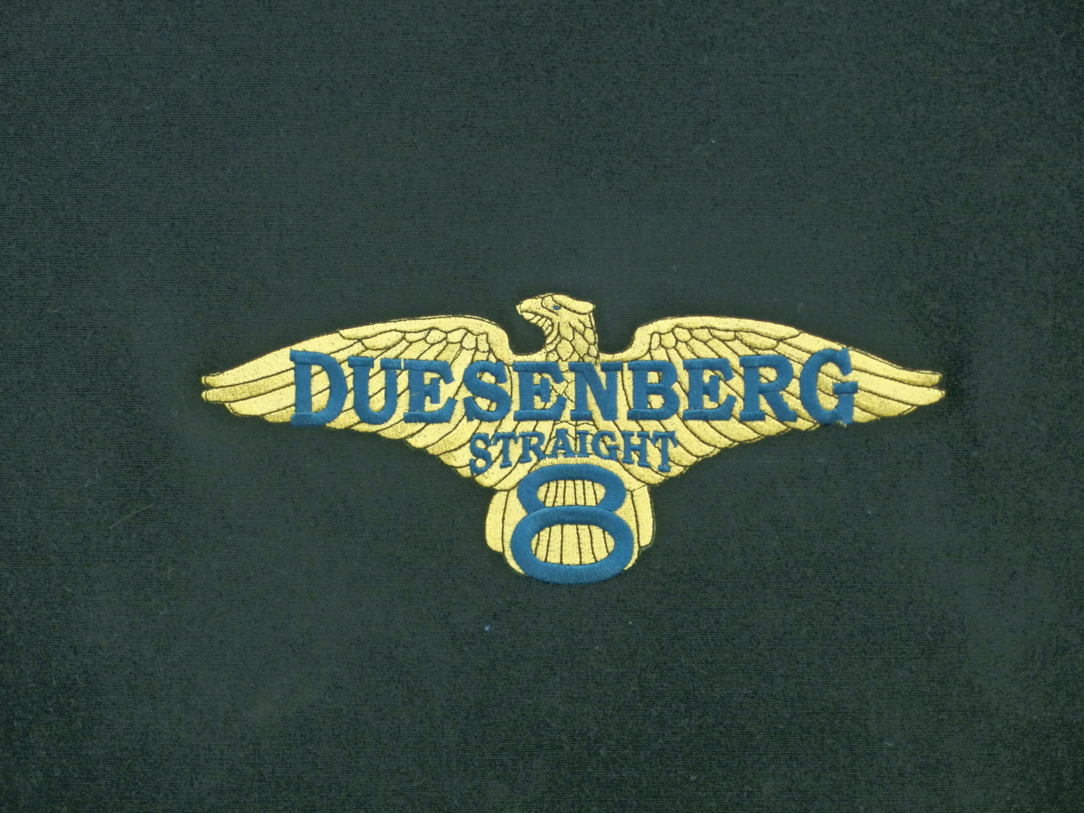 Auto- und Technikmuseum Sinsheim